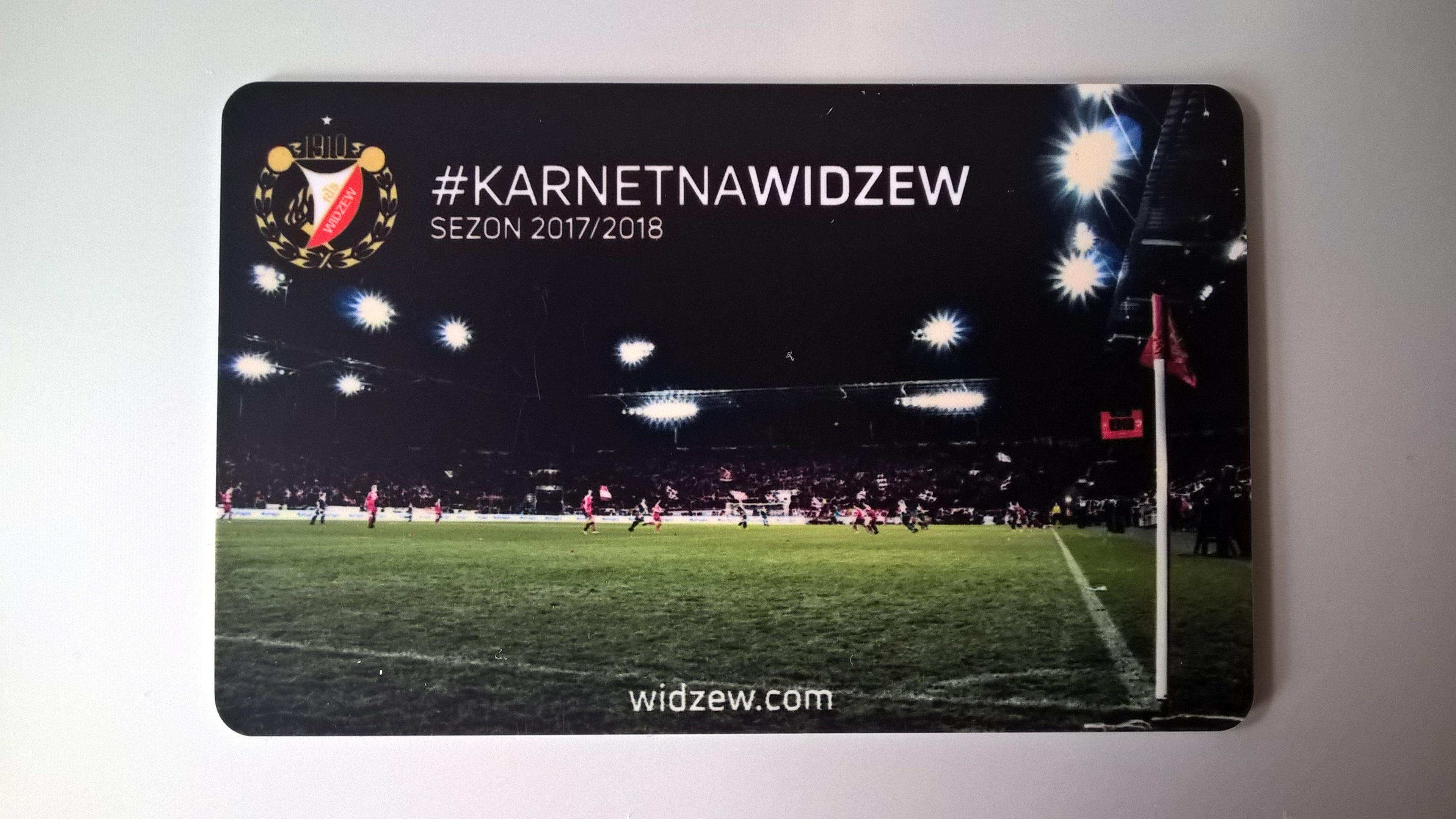 Karnet na stadion Widzewa Łódź – sezon 2017/2018